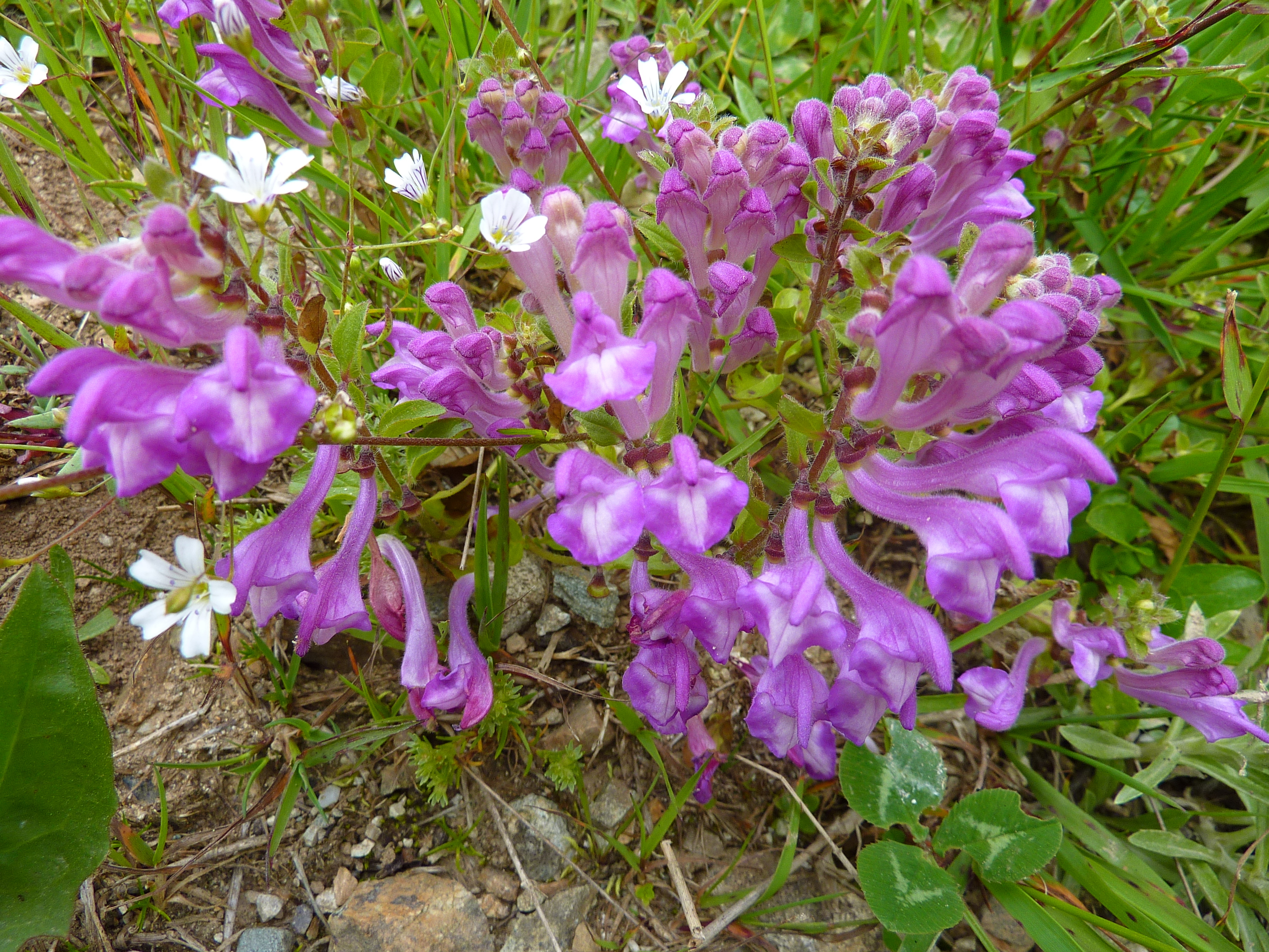 Scutellaria pontica